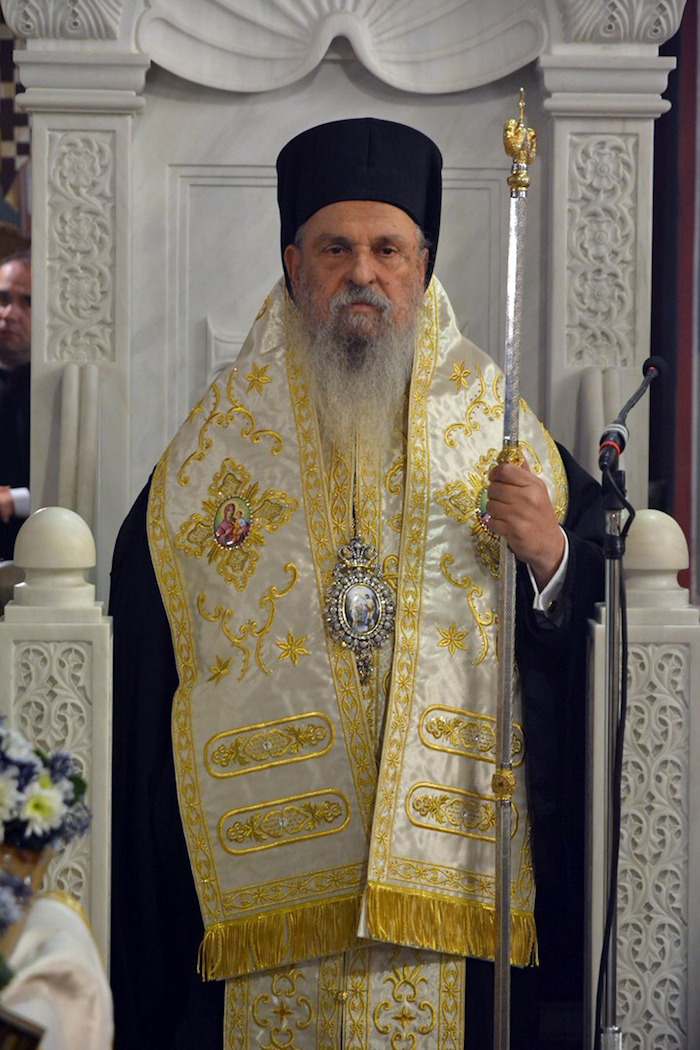 Ο μακαριστός Μητροπολίτης Λαρίσης και Τυρνάβου Ιγνάτιος Α'